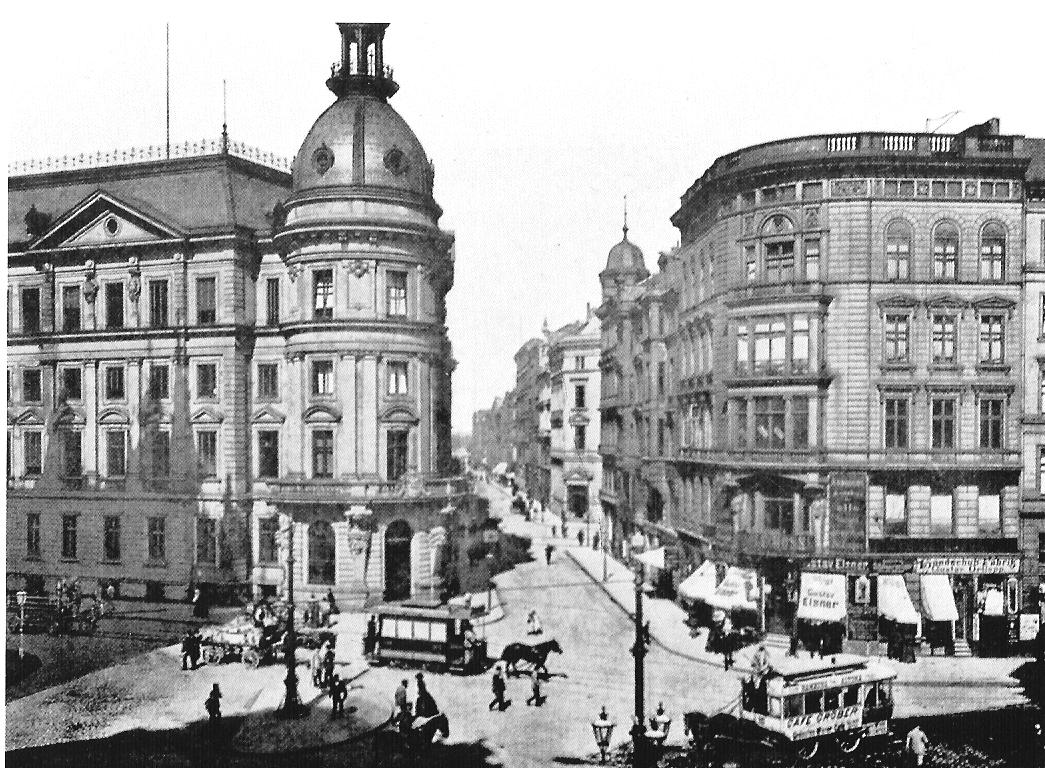 Stadthausbrücke und Neuer Wall in Hamburg-Neustadt im Jahre 1892.